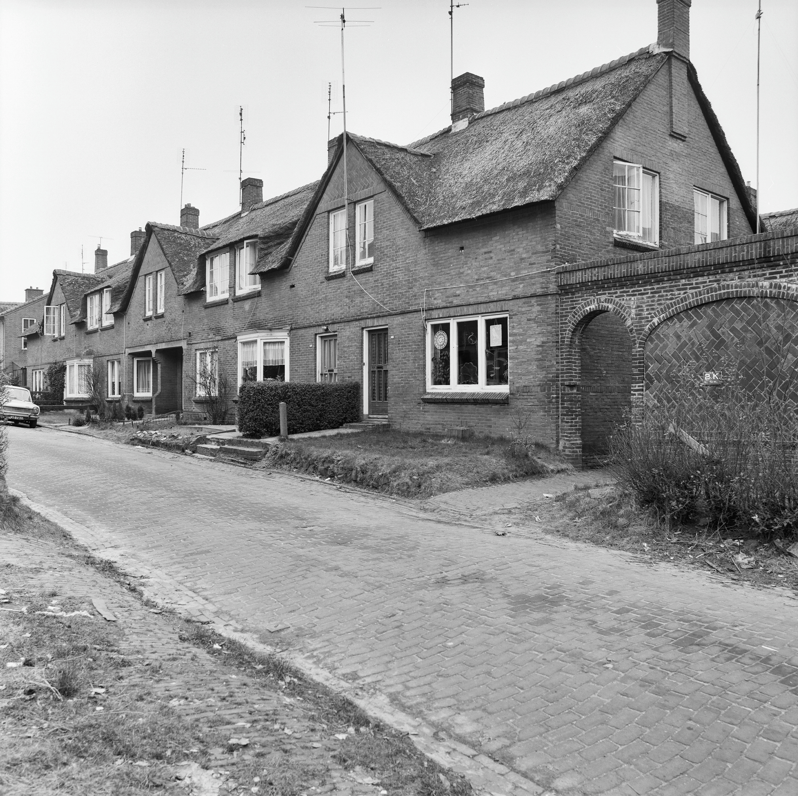 en hoger, overzicht